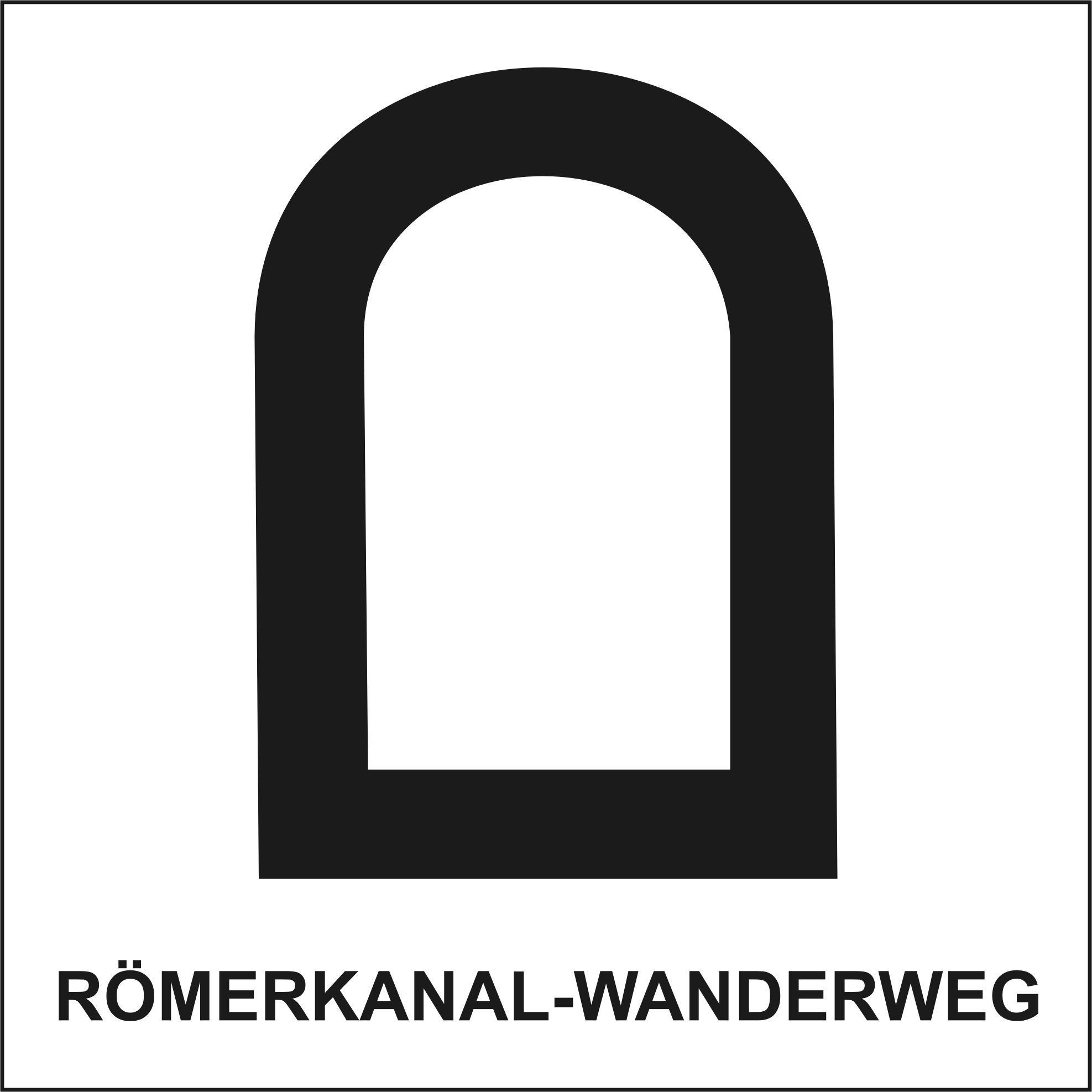 Das neue Logo des Römerkanal-Wanderweges